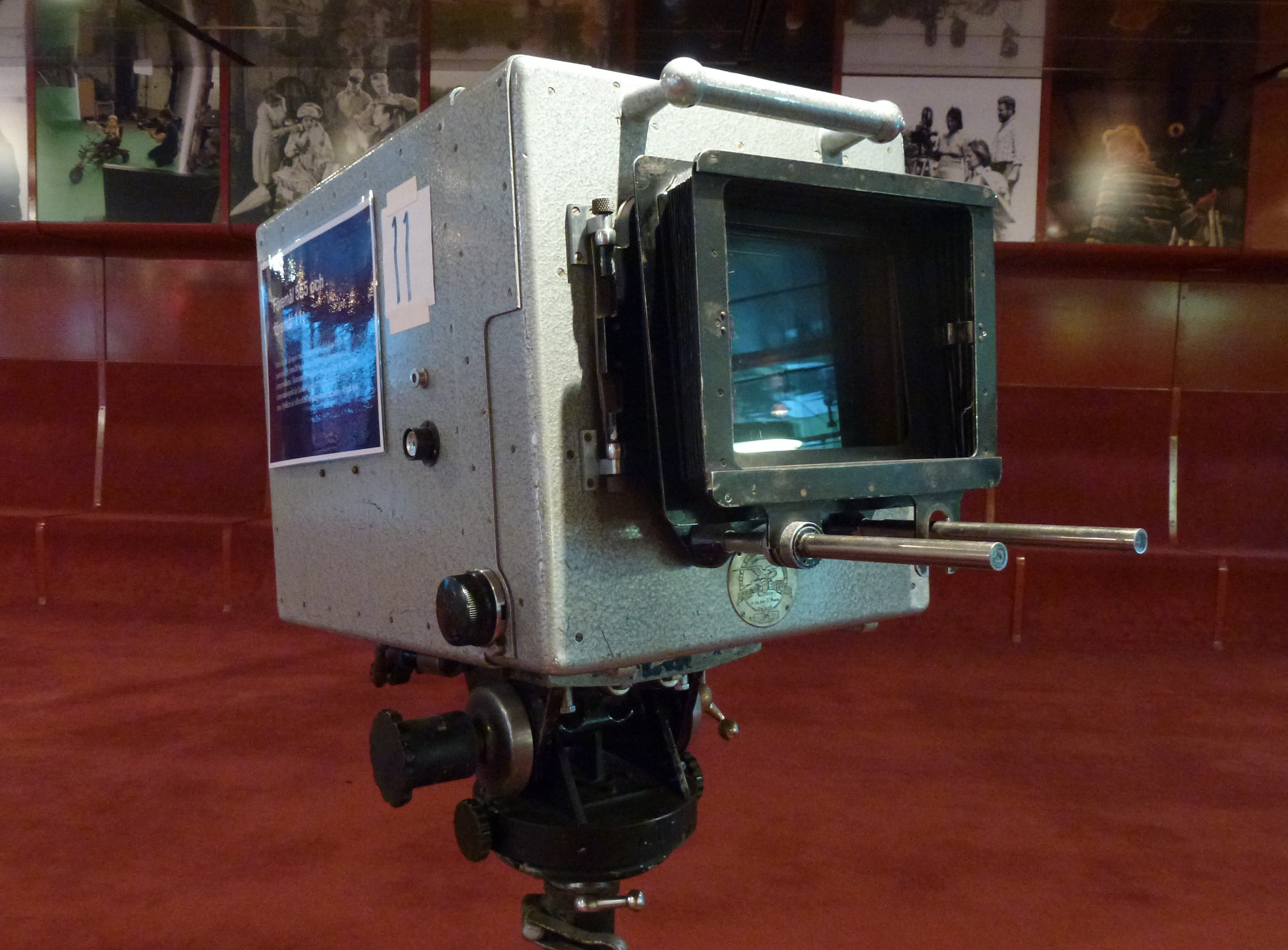 André Debrie 35 mm kamera "Super Parvo" på Filmhuset, Stockholm